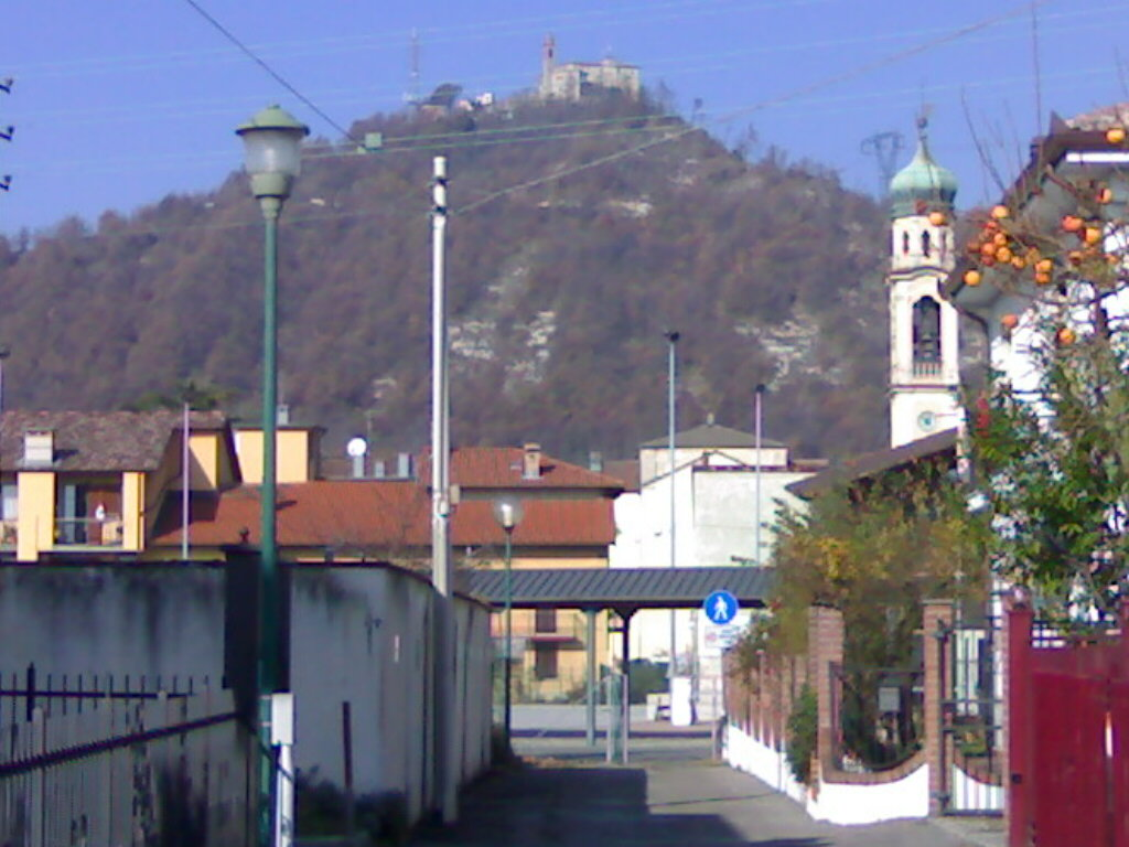 vista di Vignole da via Genova